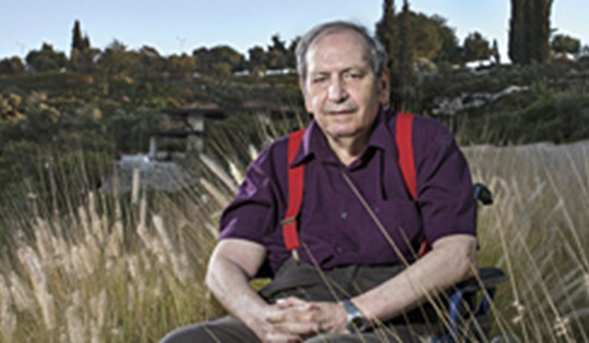 אדריכל שלמה אהרונסון